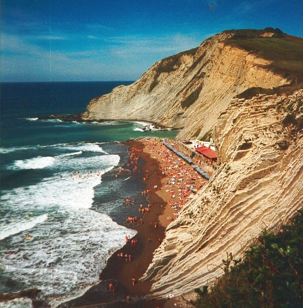 Itzurun beach (Zumaia - Gipuzkoa - Spain)